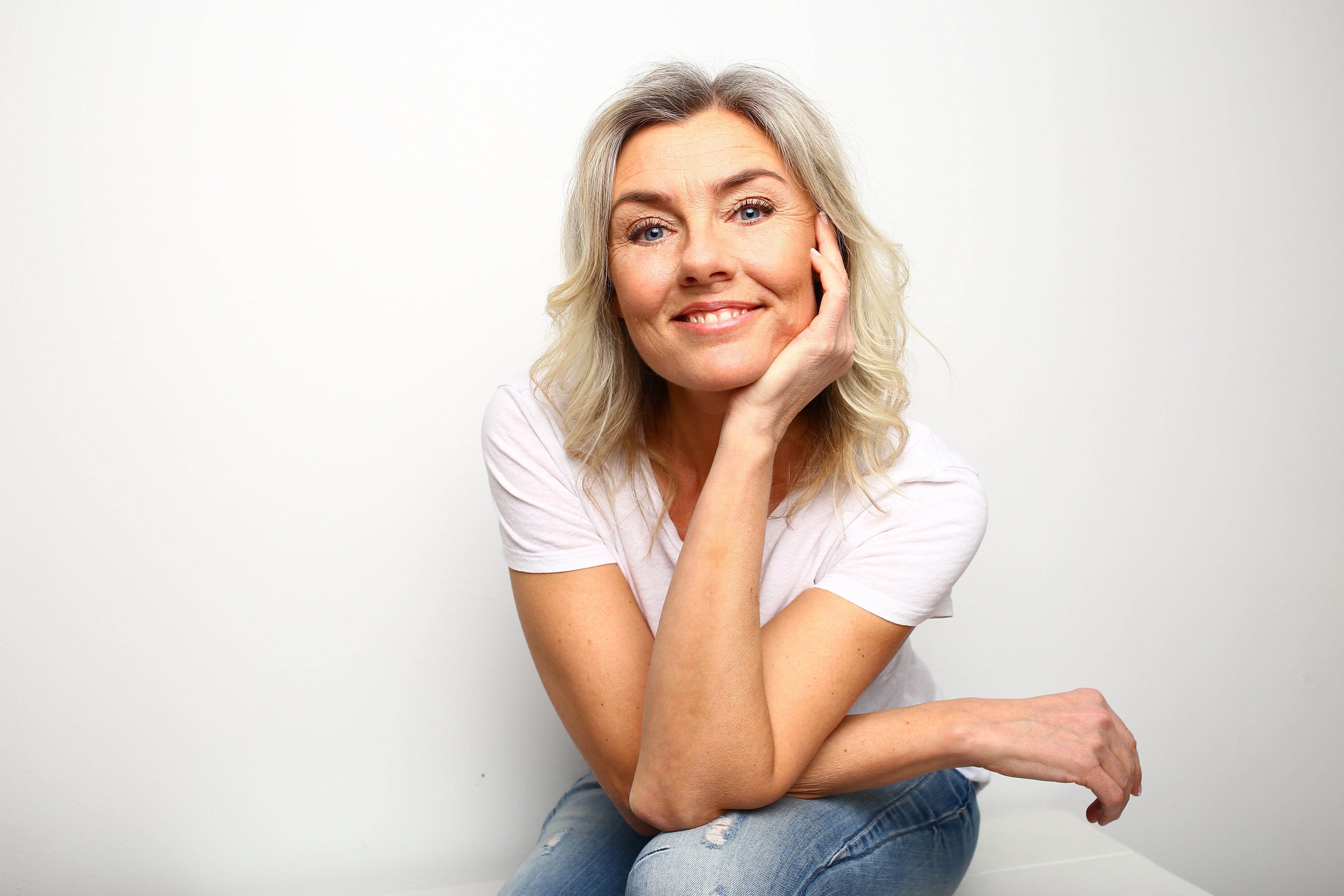 Anna Carlsson